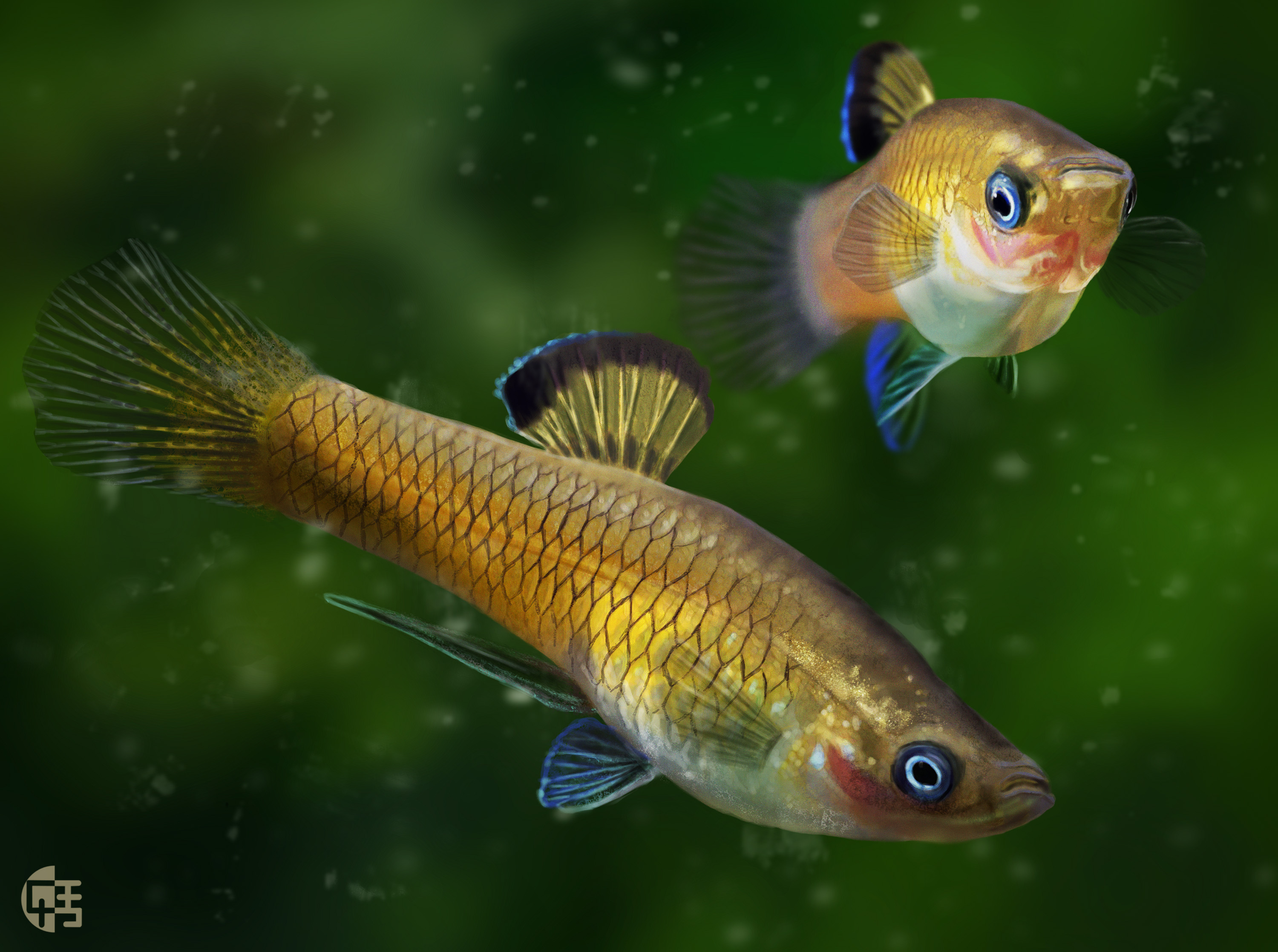 Macho y hembra de Phallichtys tico, una olomina endémica de los lagos y ríos en la zona Norte de Costa Rica. Su tamaño máximo es 35 mm. Viven en cardúmenes pequeños cerca de la orilla, entre la maleza, donde se alimentan de algas, diatomeas, cieno y larvas de insectos. Como en otros miembros de la familia Poeciliidae, el macho se caracteriza por tener su aleta anal modíficada en una estructura conocida como gonopodio, que utiliza durante la cópula. Son vivíparos. Esta especie fue descrita por el ictiólogo costarricense William Bussing en 1963. El epíteto "tico" hace referencia al gentilicio con el que se conoce a los costarricenses en América Latina. Don William falleció en 2014, luego de una larga trayectoria llena de invaluables contribuciones al conocimiento ictiológico de Costa Rica y Centroamérica. Esta ilustración se realizó en su memoria, y en el marco del IV Simposio Latinoamericano de Ictiología, a realizarse en Costa Rica en Noviembre de 2015.